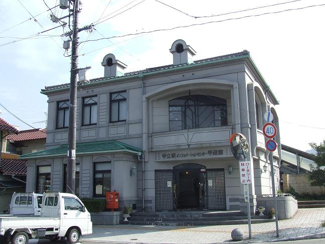 JR西日本芸備線甲立駅の駅舎